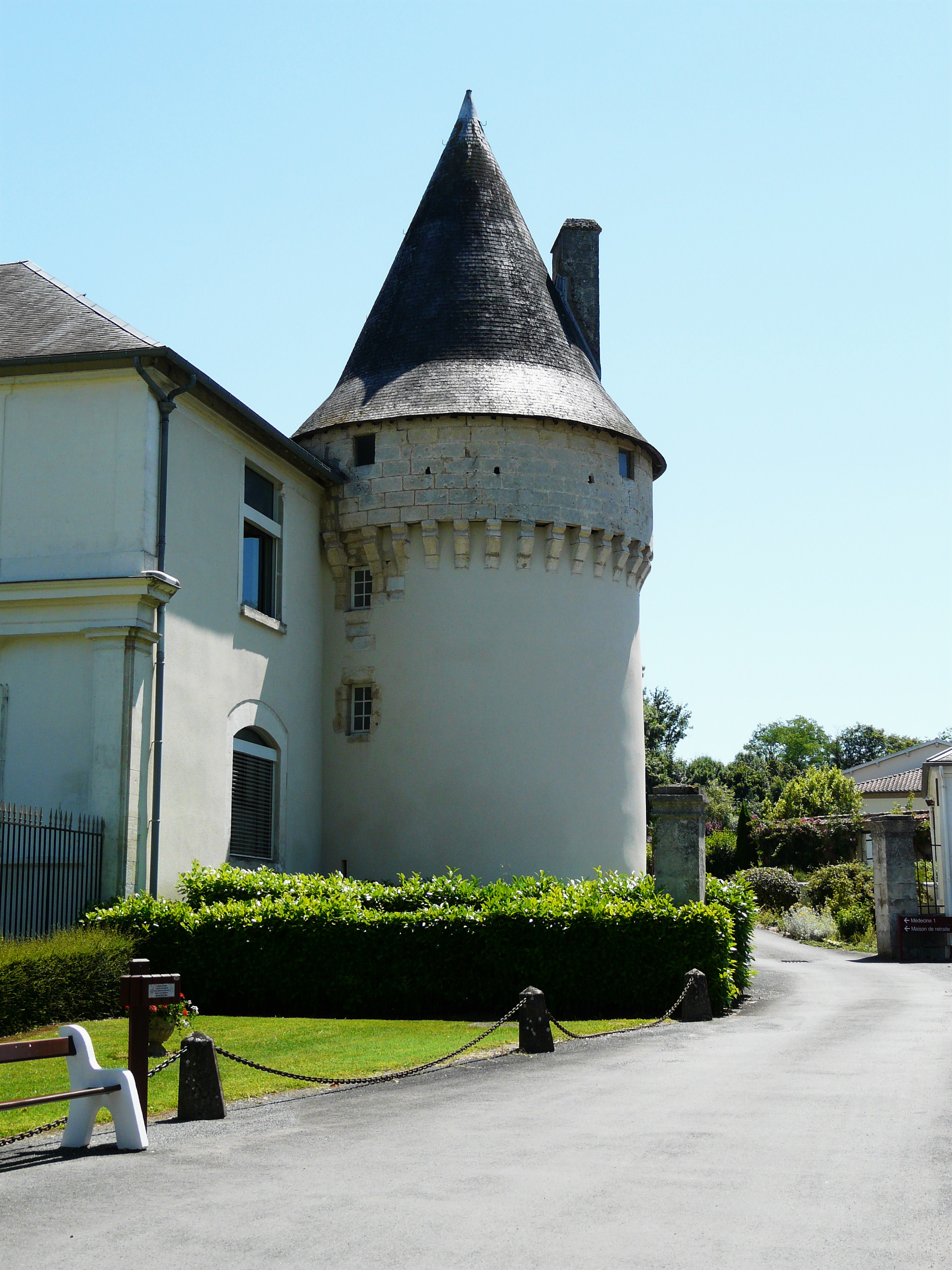 La tour sud-ouest du château de Lanmary à Antonne-et-Trigonant, Dordogne, France